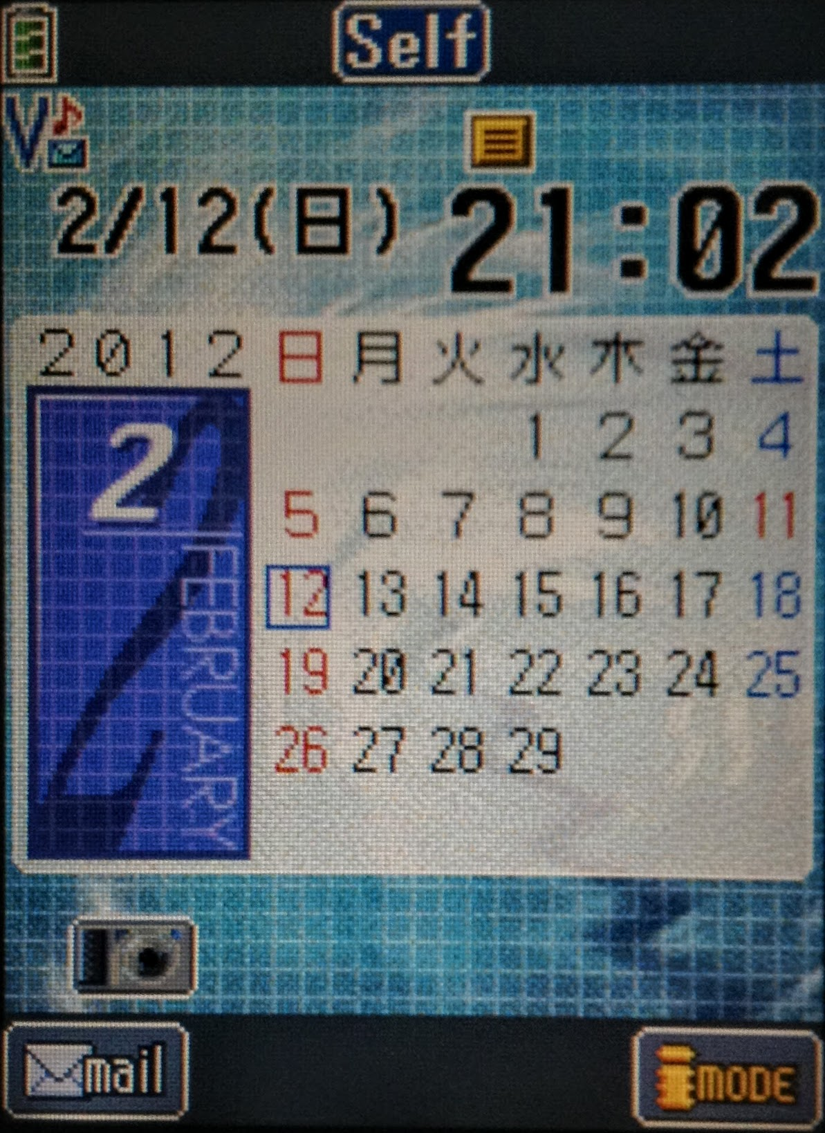 N2102Vに搭載されたTFT液晶のディスプレイ・待ち受け画面に設定されているのはカレンダー(背景の水紋はN2701より継承)